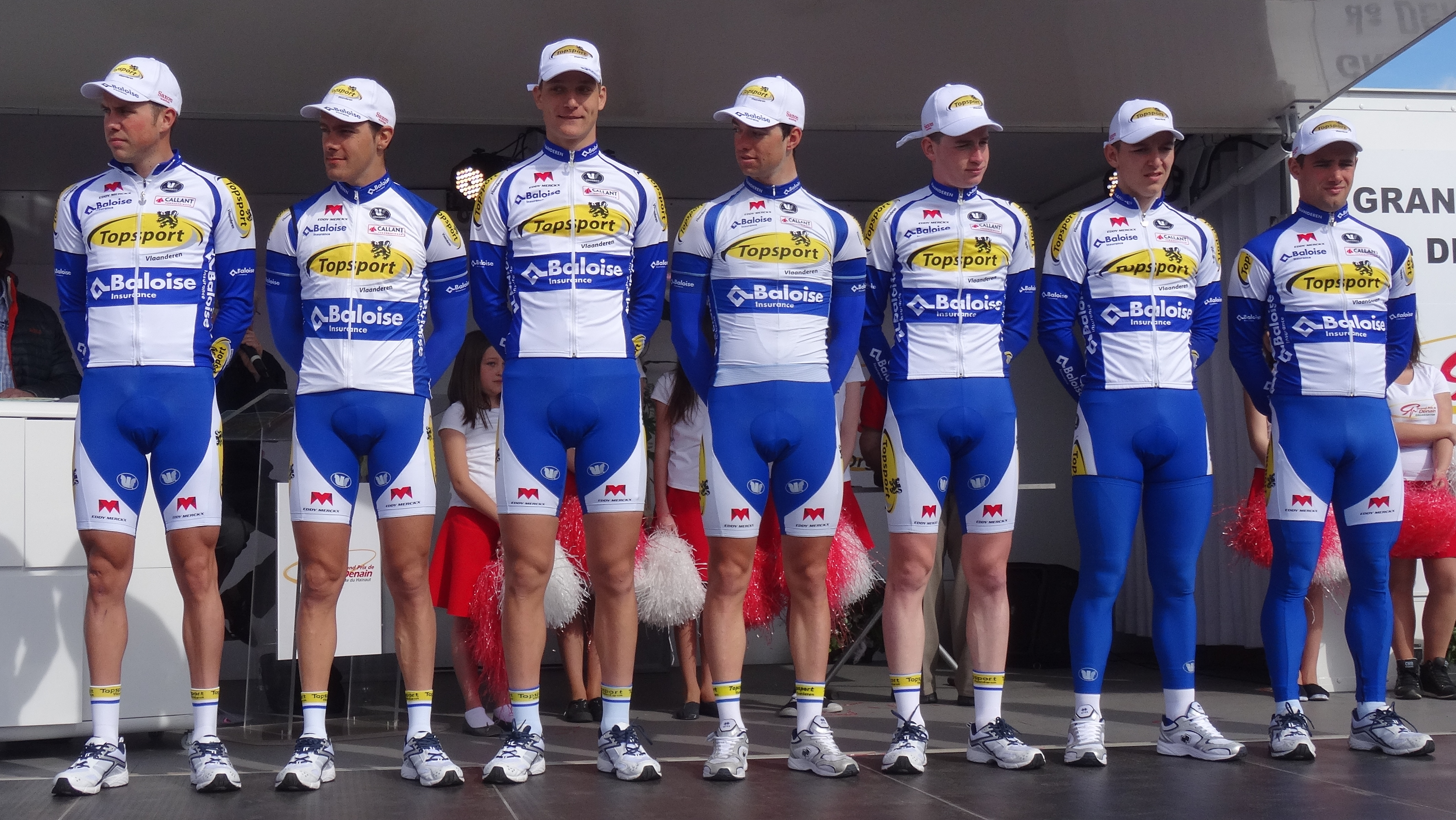 Reportage réalisé le jeudi 17 avril à l'occasion du départ et de l'arrivée du Grand Prix de Denain 2014 à Denain, Nord, Nord-Pas-de-Calais, France.